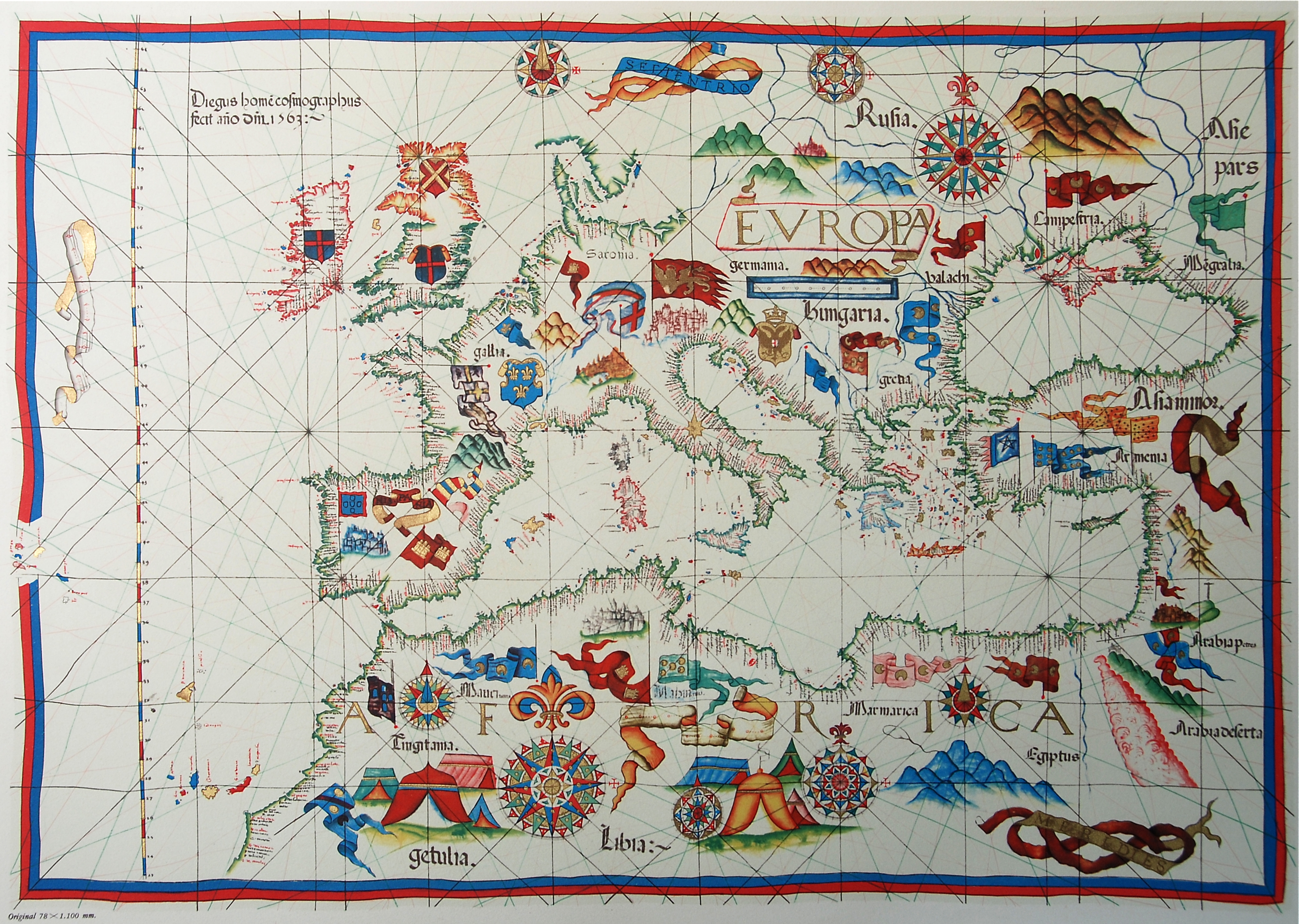 Portolan chart by Diogo Homem, 1563. Biblioteca Nazionale, Firenze